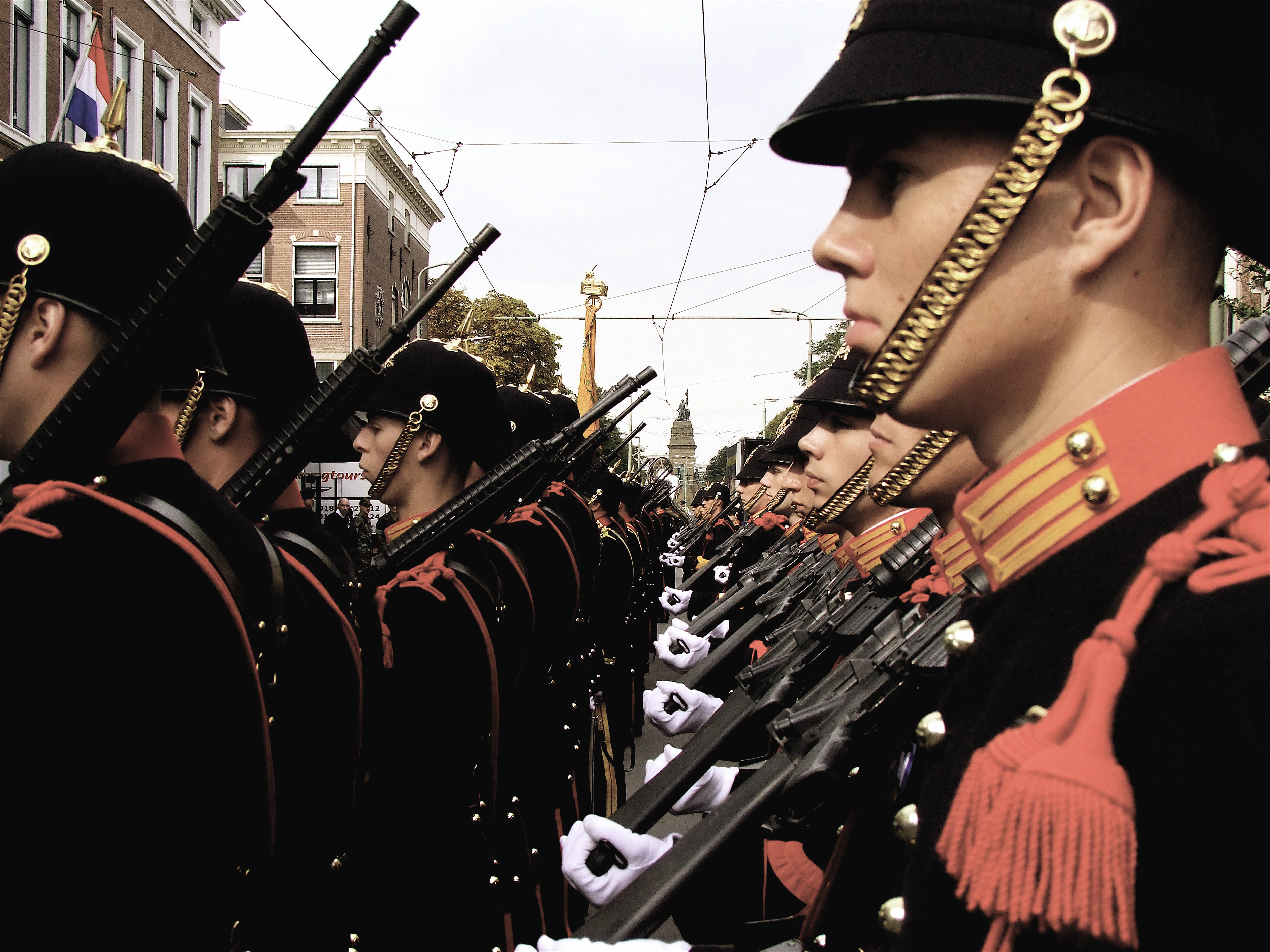 Foto van Het Korps Mariniers met op de achtergrond het standbeeld van plein 1813 en links het vaandel